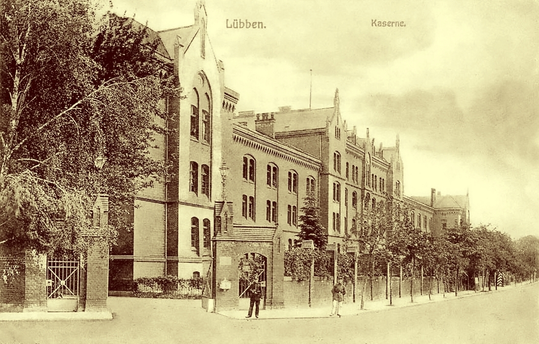 barracks luebbener soldiers